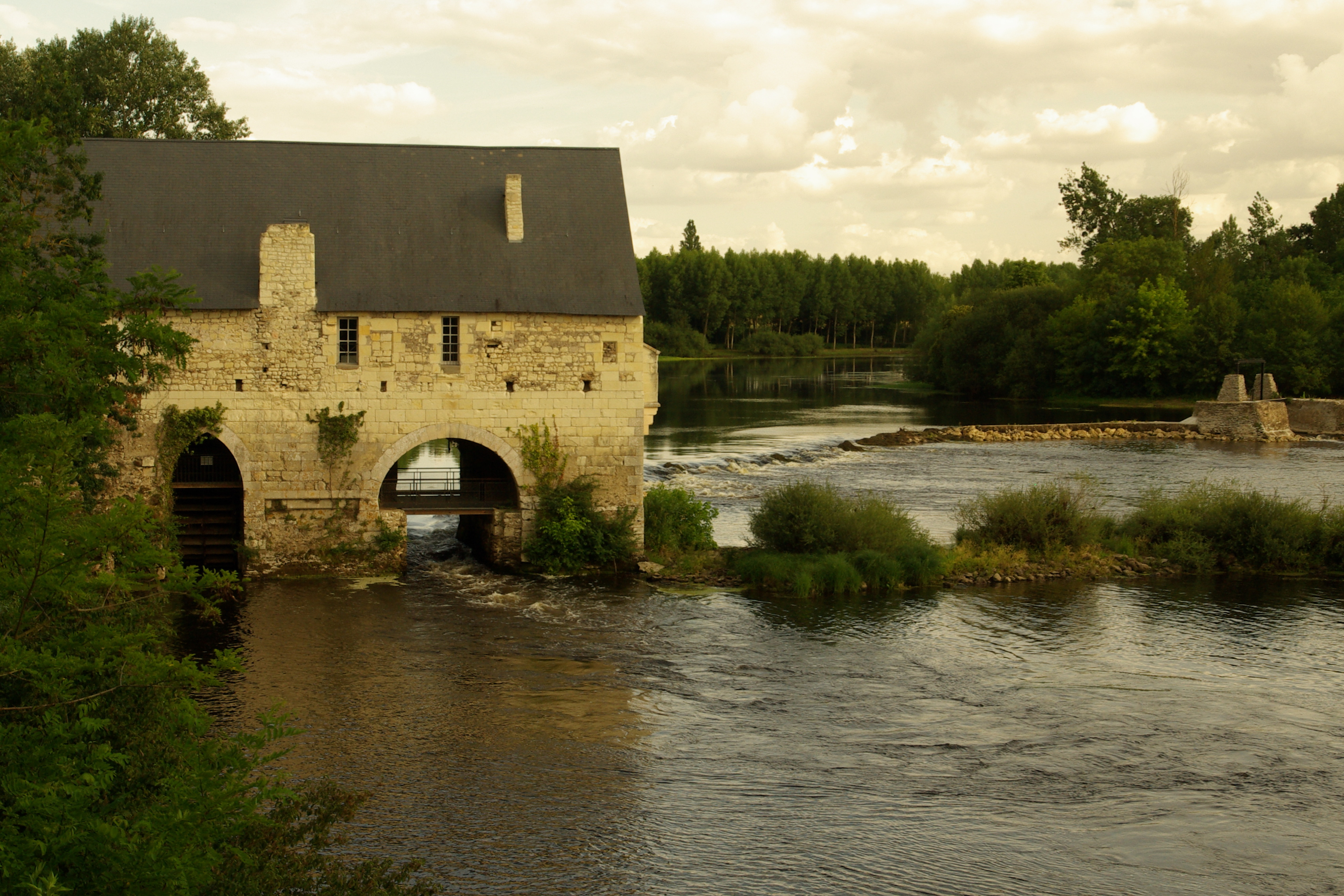 Le moulin de Chitré sur la Vienne, à Vouneuil-sur-Vienne.